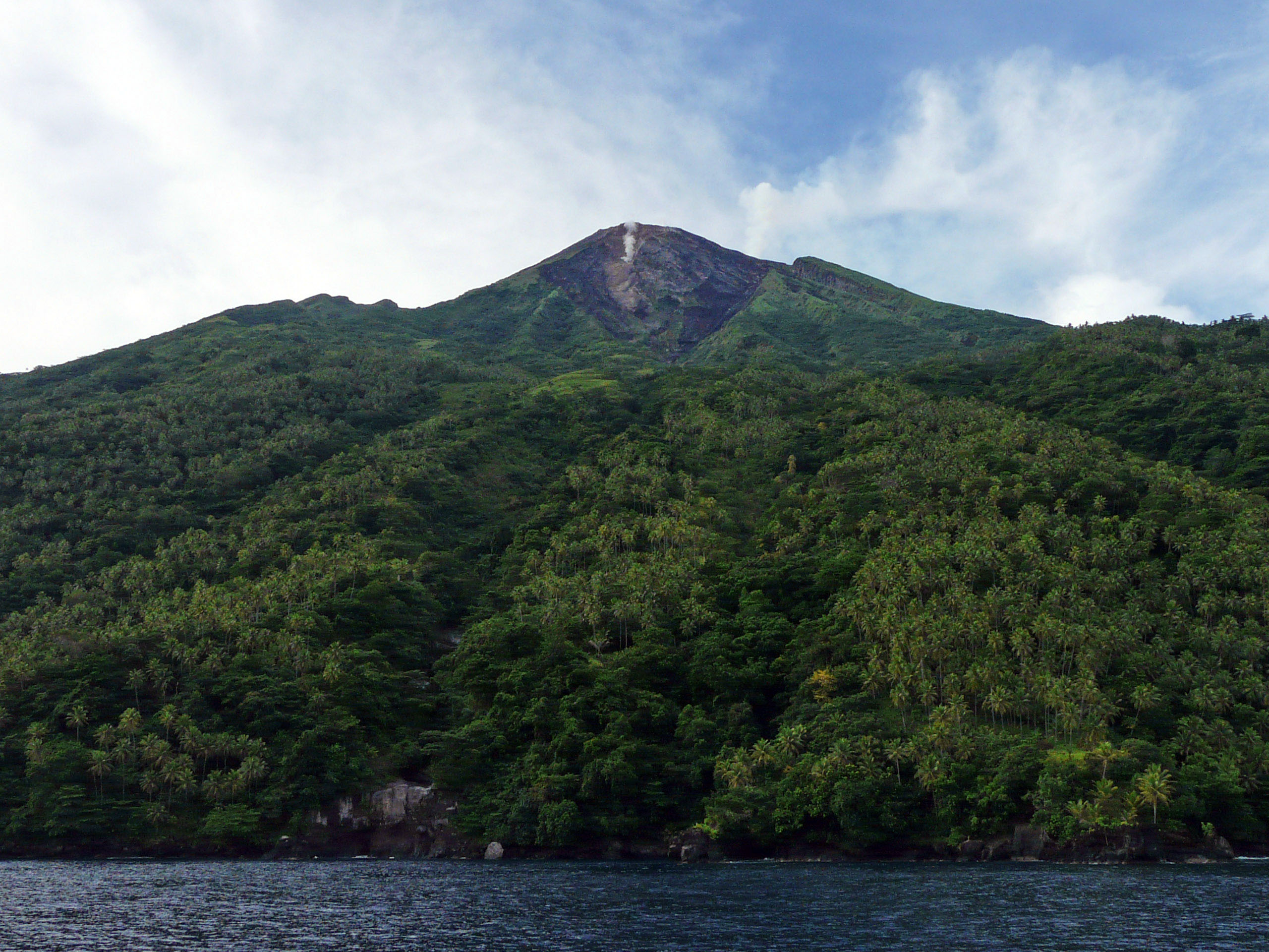 Gipfel des Vulkans Karangetang auf der Indonesischen Insel Siau - aufgenommen a. 15. April 2009